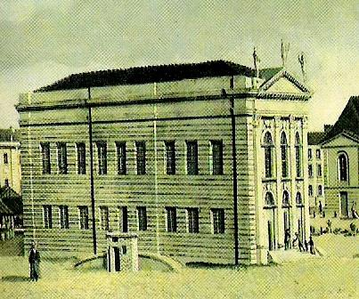 Ansicht des Französischen Komödienhauses auf dem Gendarmenmarkt in Berlin, 1788.